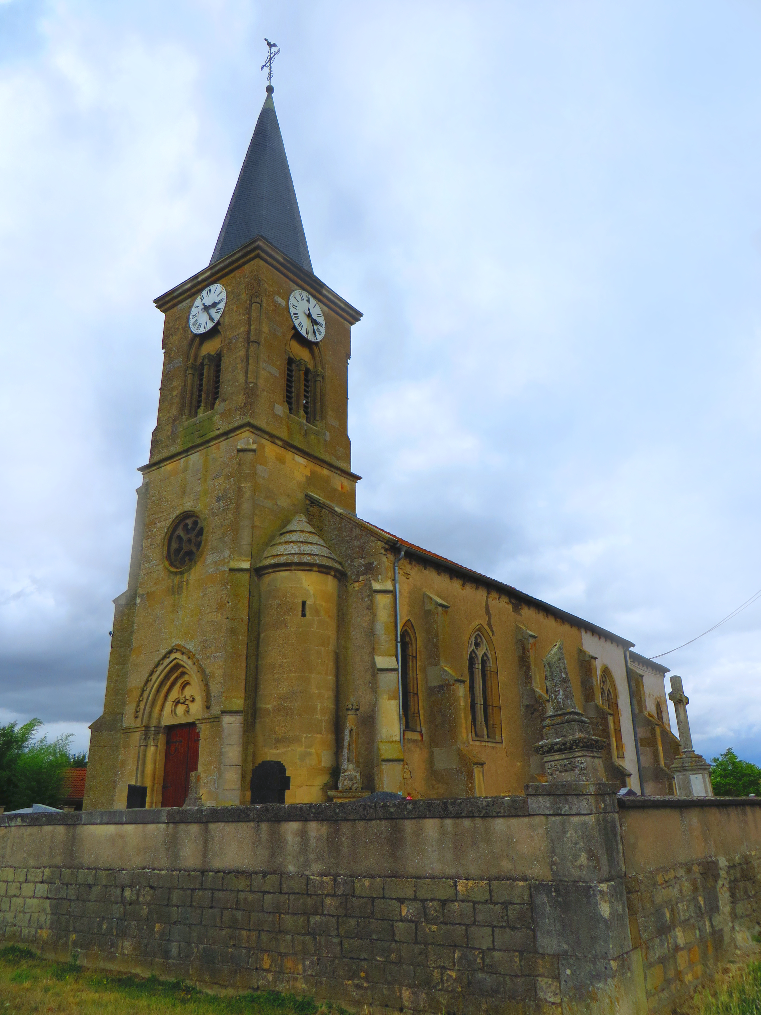 Labeuville L'église de l'Assomption de la Vierge